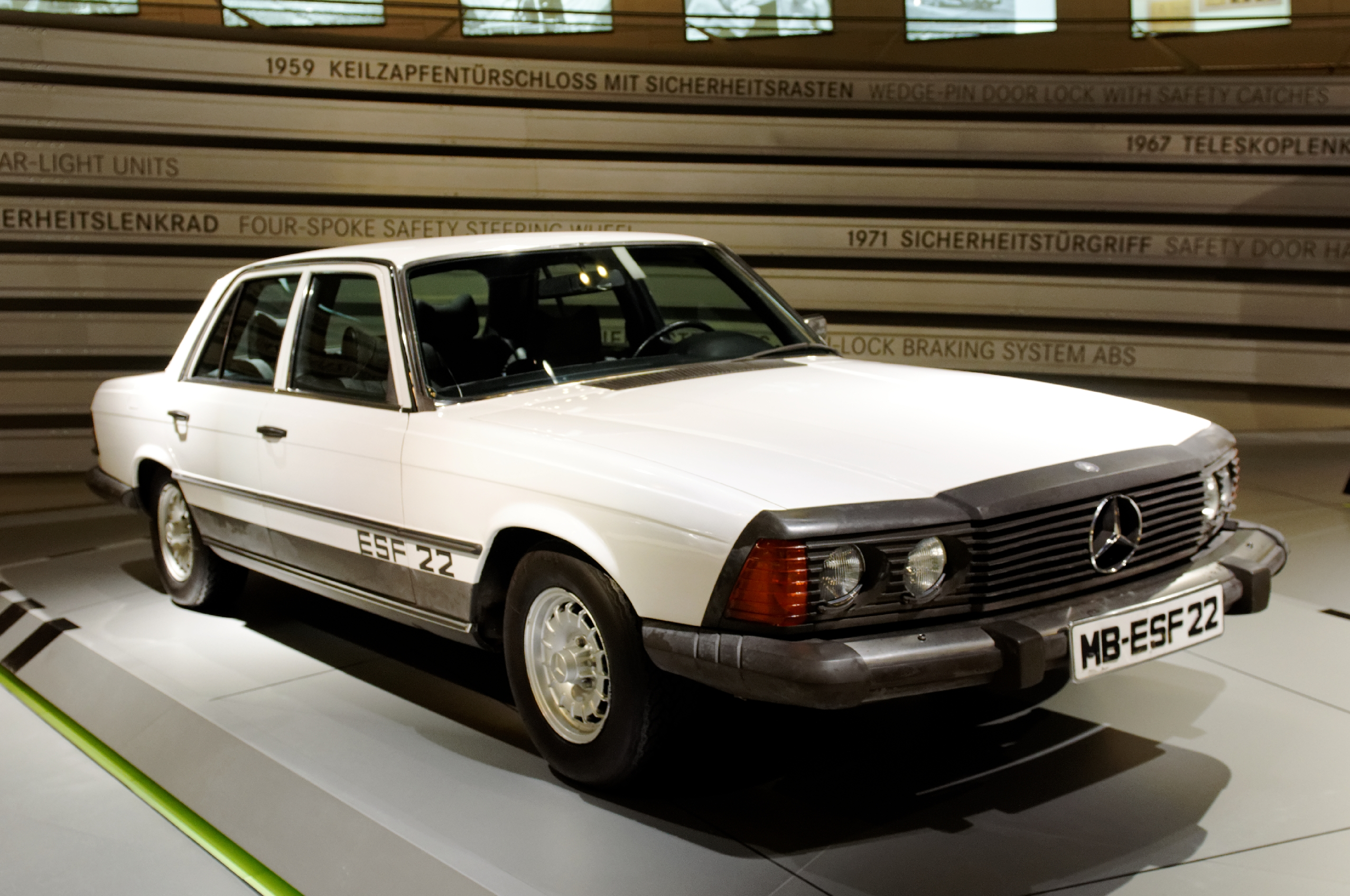 Bilder aus dem Mercedes-Benz-Museum 2015